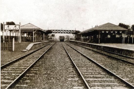 中文（中国大陆）: 1920年海宁硖石火车站